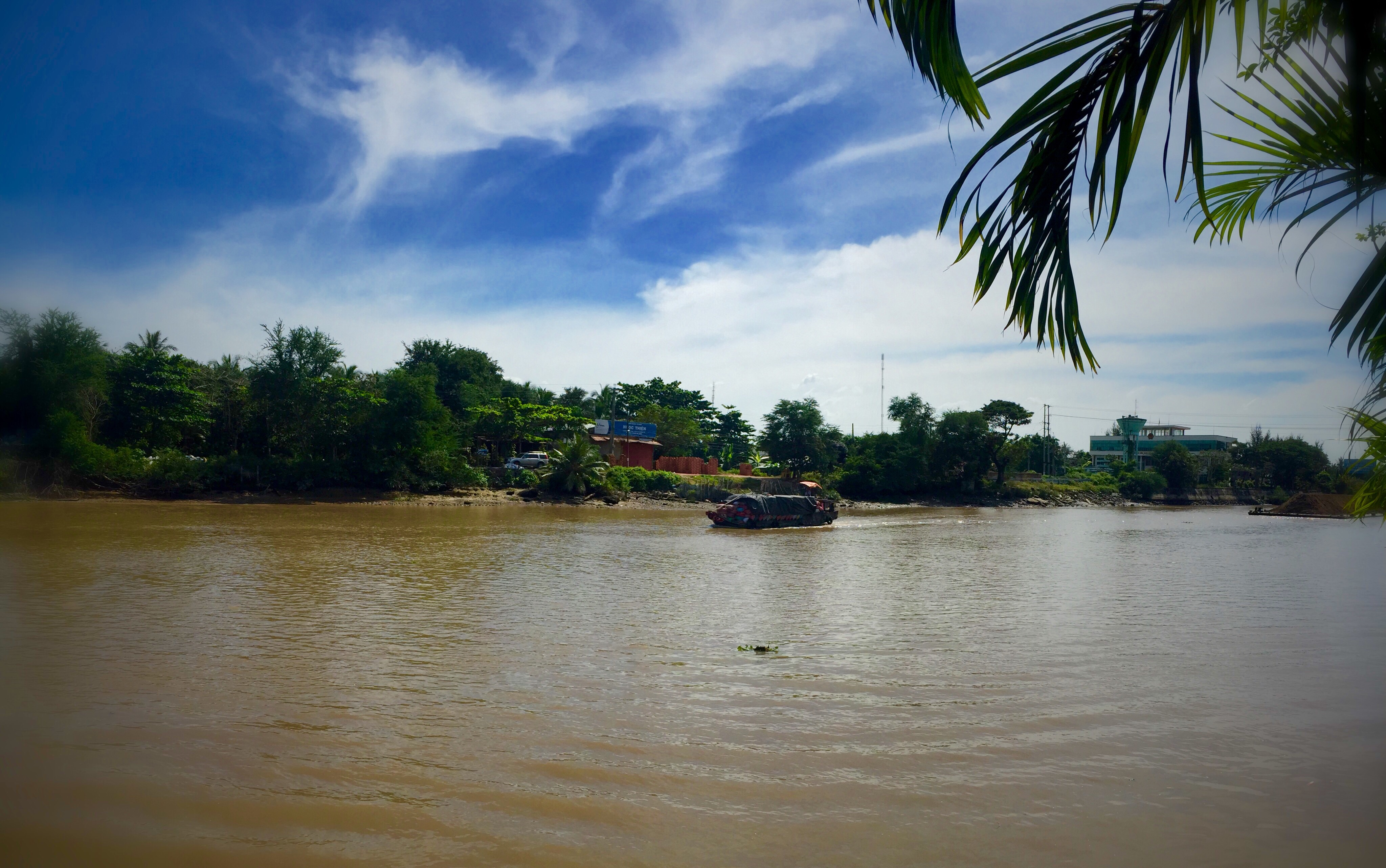 Song Cho Gao, tt Cho Gao, Tien giang, Vietnam